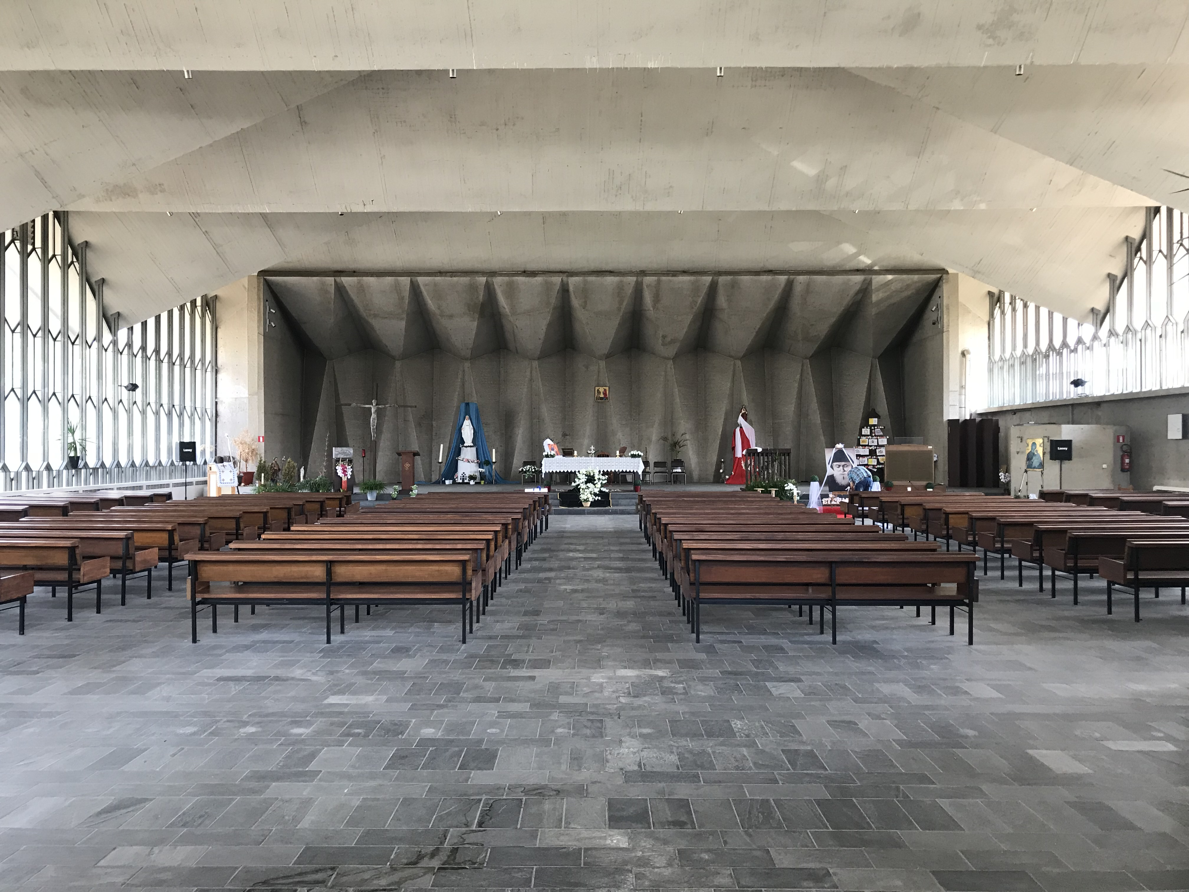 Eglise paroissiale Saints-Pierre-et-Paul à Droixhe, Liège